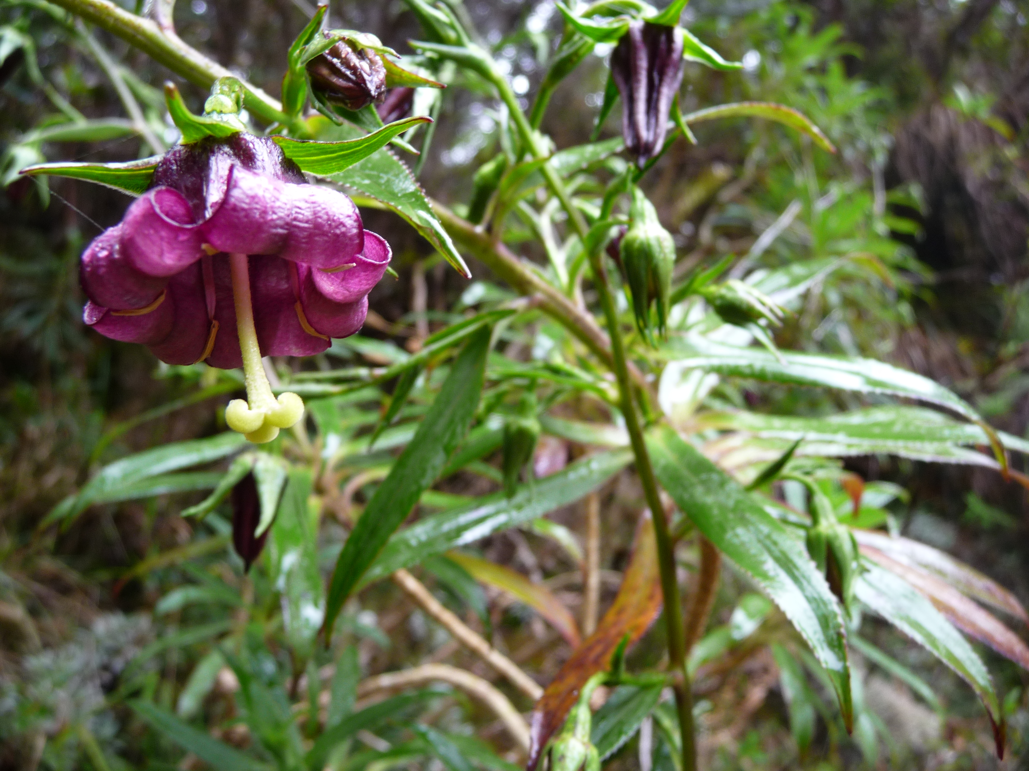 Heterochaenia ensifolia, famille des Campanulacées, île de la Réunion, photo personnelle prise en octobre 2009